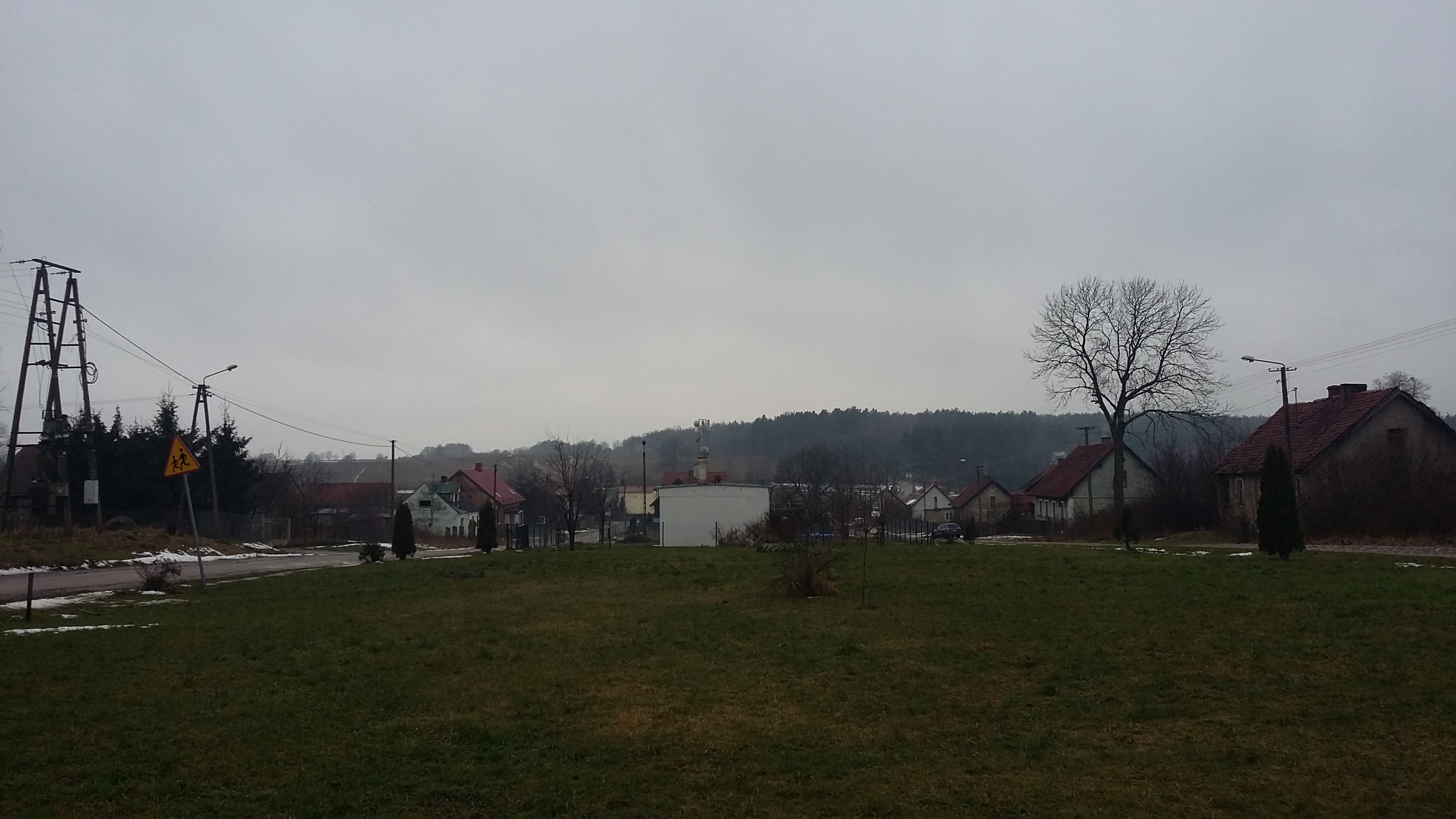 Bartoszki, gmina Nidzica